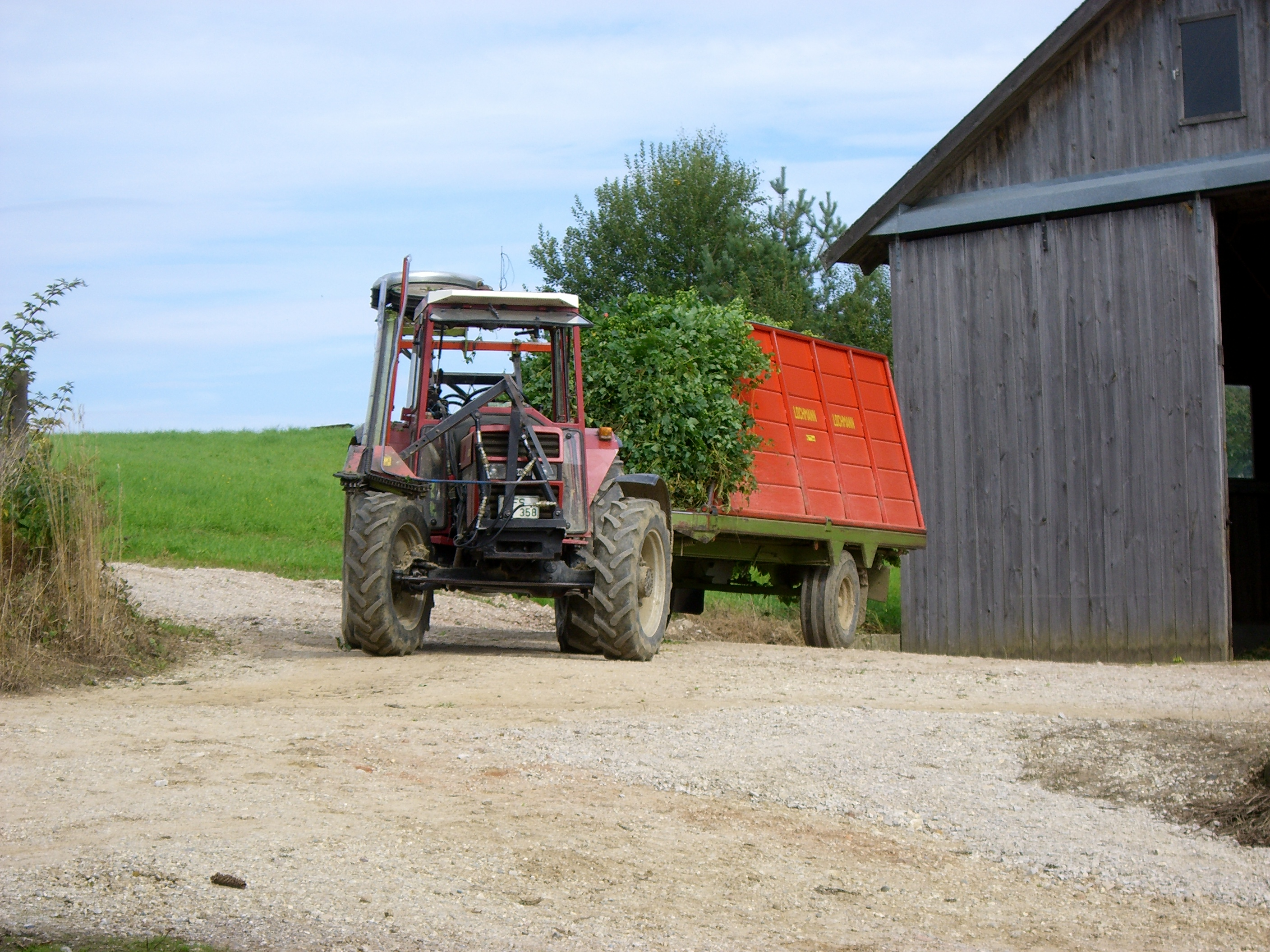 Case-Schlepper mit Hopfenreißgerät, Hallertau, Deutschland